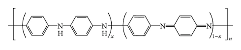 polüaniliin